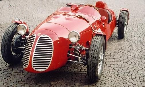 Bandini 1100 siluro foto del 2002 fatta a forlì,italia tratta dal sito